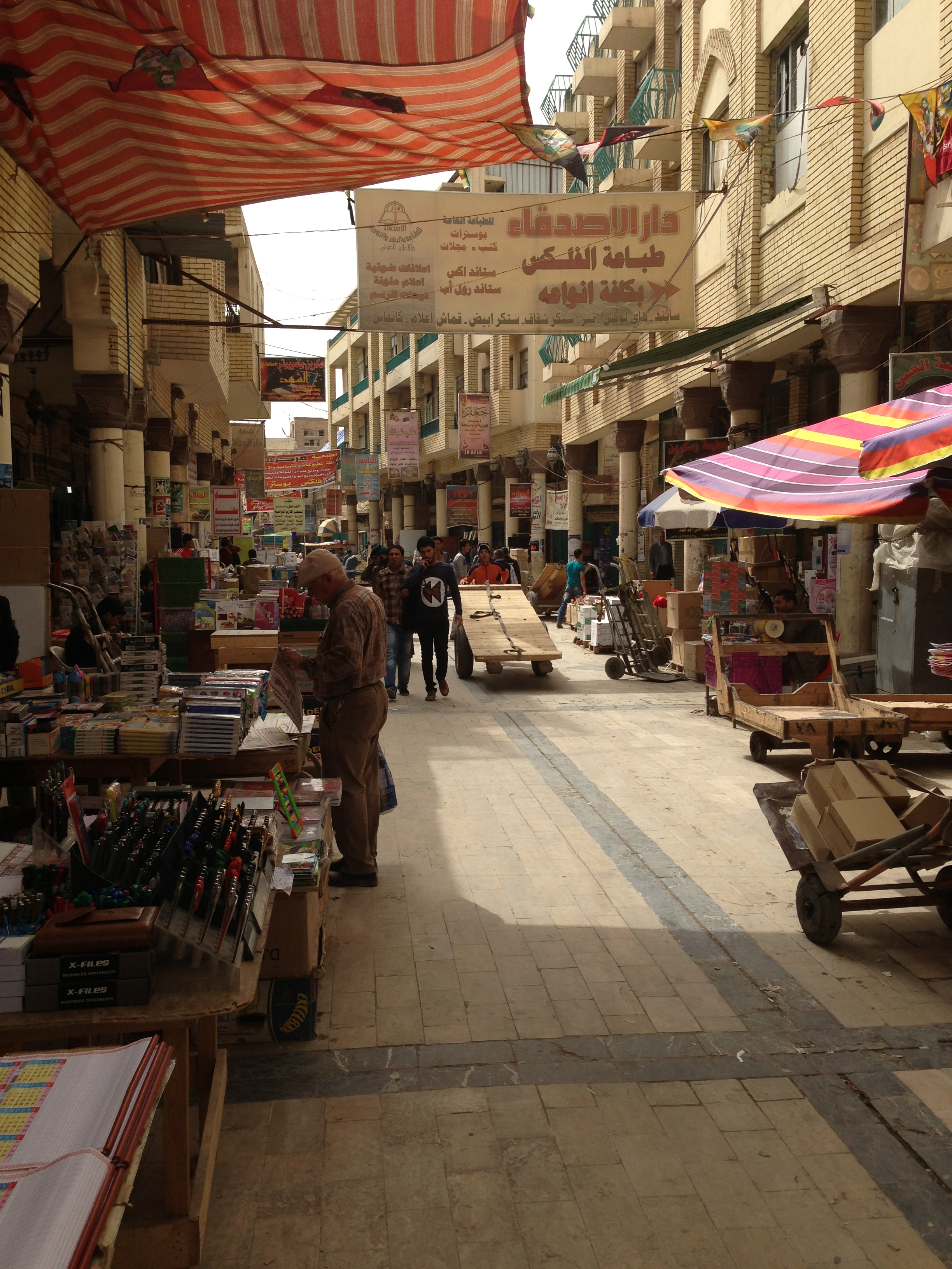 Baghdad, 2013